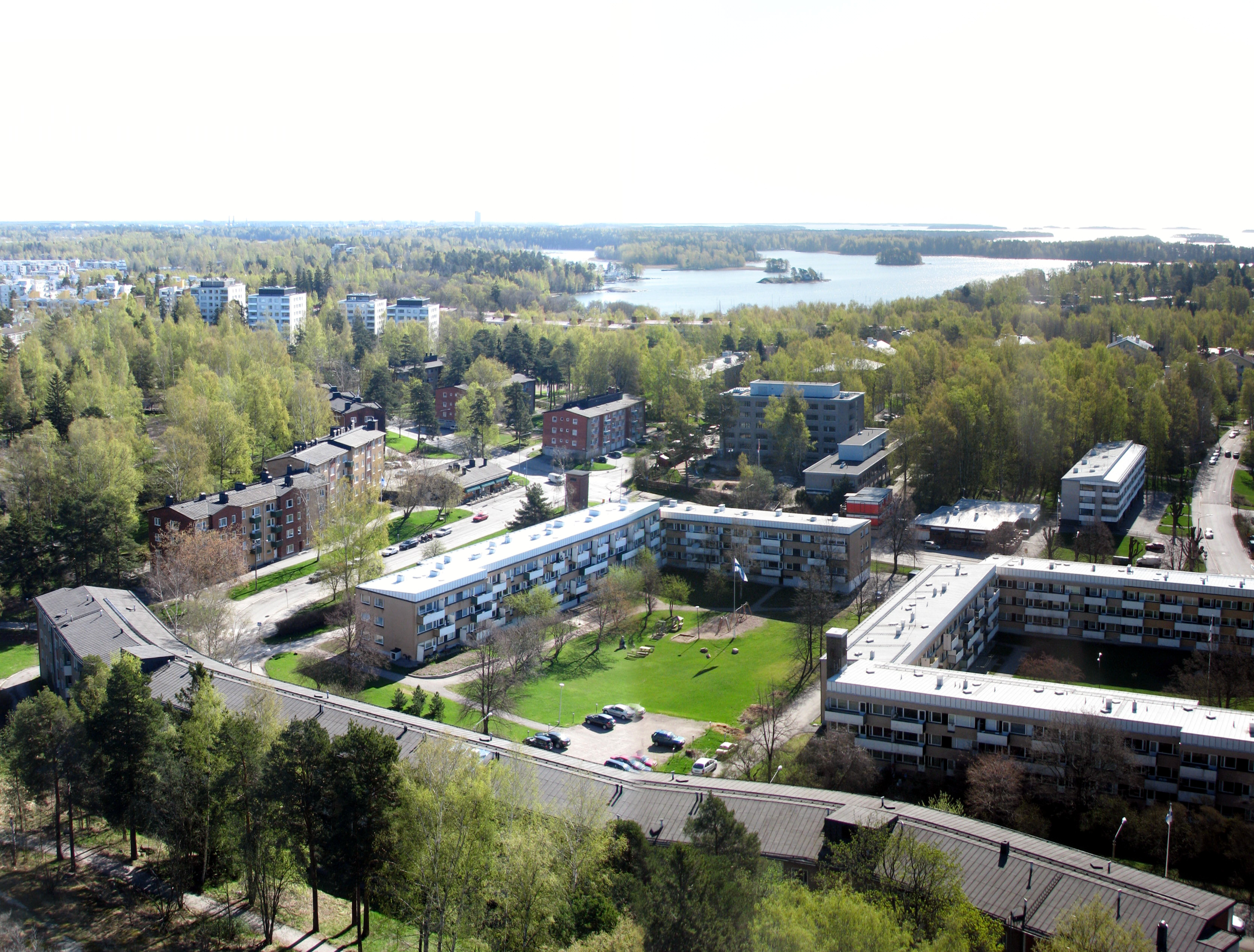 Ala-Roihuvuorta nähtynä Roihuvuoren vesitornista.